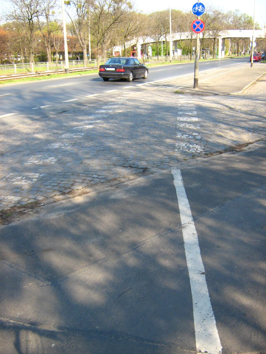 Bicycle path (ścieżka rowerowa), Wróblewskiego, Wrocław, Poland